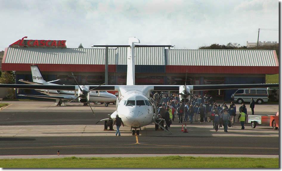 Aerogare do aerodromo de Tires